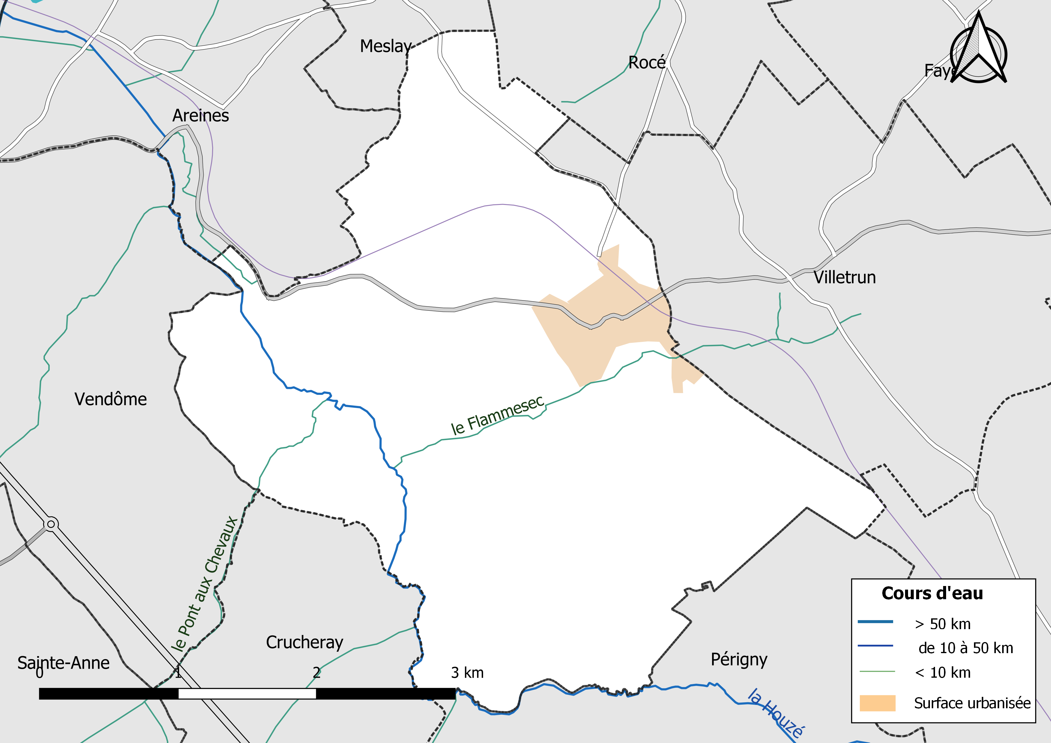 Carte du réseau hydrographique de la commune de Coulommiers-la-Tour (Loir-et-Cher, France).